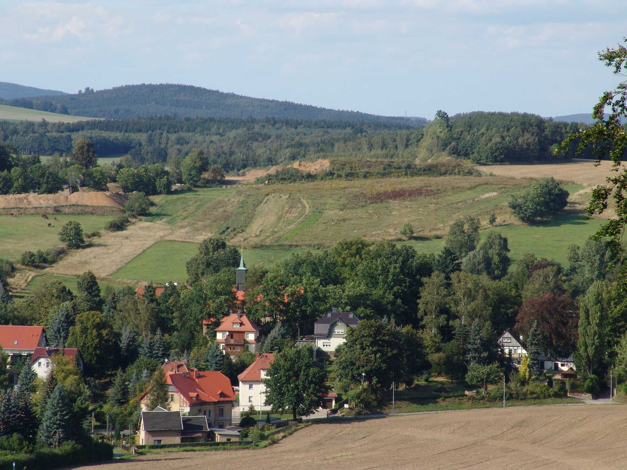 Blick auf Ebersbach/Sa., Landkreis Görlitz, Sachsen